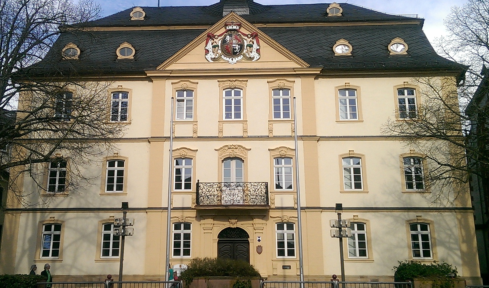 Krin: Westfront des Piaristenkollegs